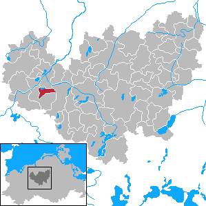 Dreetz in Mecklenburg-Vorpommern - District Güstrow